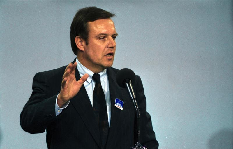 11.-13.9.1989 37. Bundesparteitag der CDU in der Bremer Stadthalle